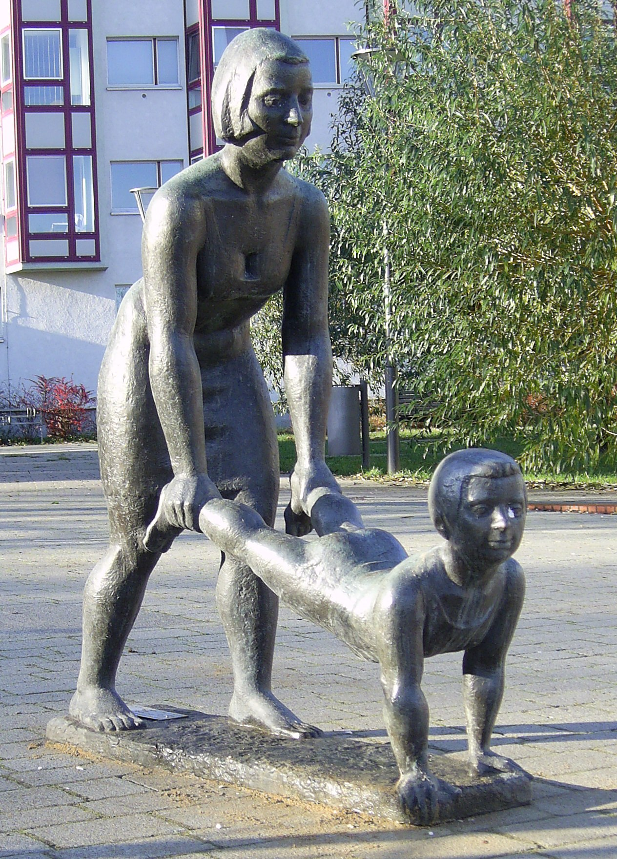 Plastik Mutter und Kind von August Martin Hoffmann in Frankfurt (Oder). Die Plastik steht südlich des Grenzübergangs "Stadtbrücke" an der Oderpromenade.